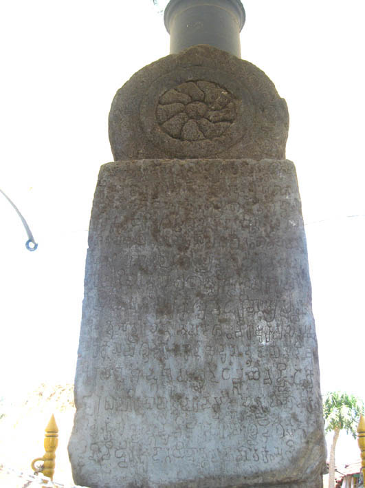 ಕನ್ನಡ: ಮೂಲ ಶಾಸನದ ನಕಲು ಪ್ರತಿ